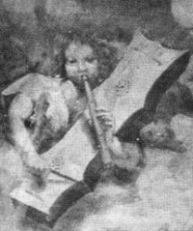 Angel playing pipe and psalterium.